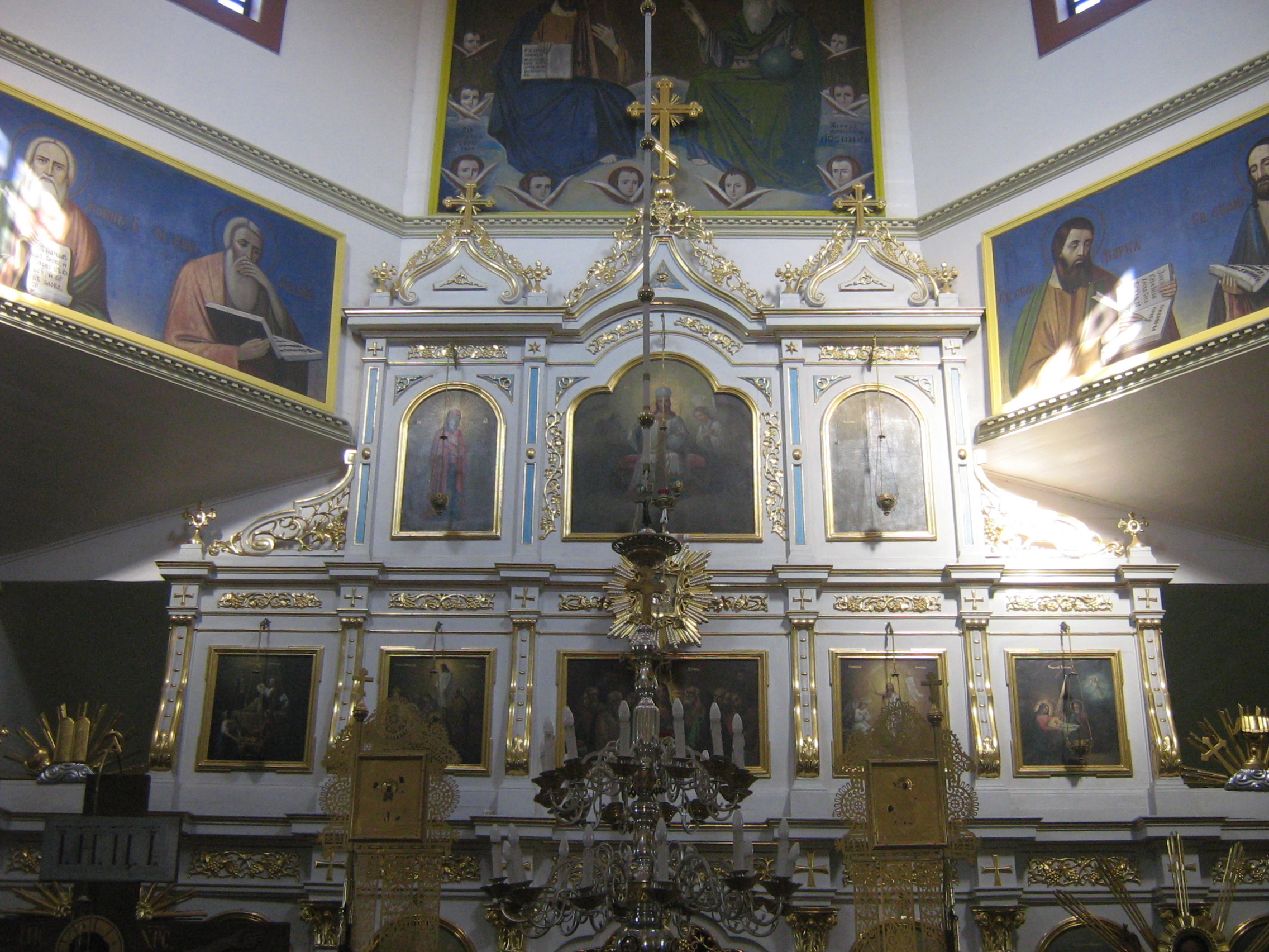 Cerkiew św. Jana w Łosince.